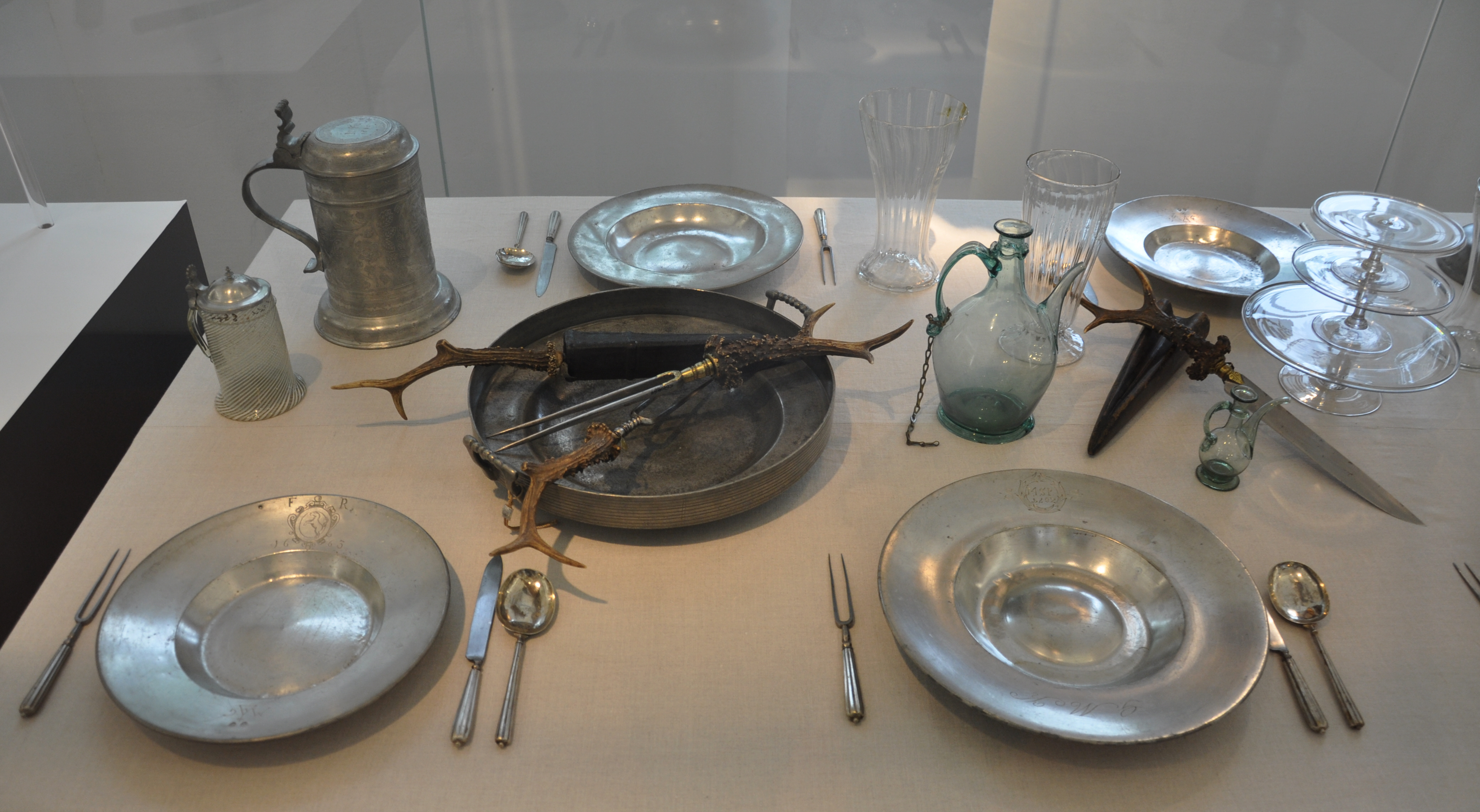 Essgeschirr und Besteck; Salzburg Museum